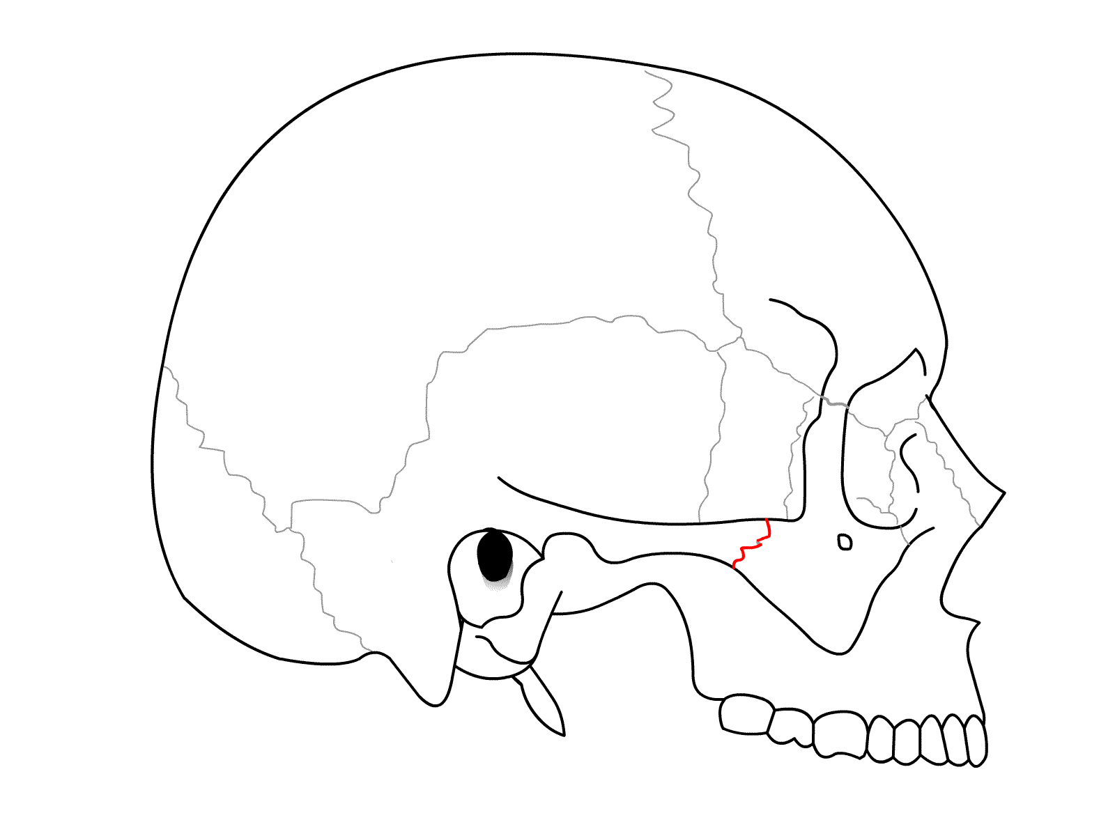 Schädel seitlich - Sutura